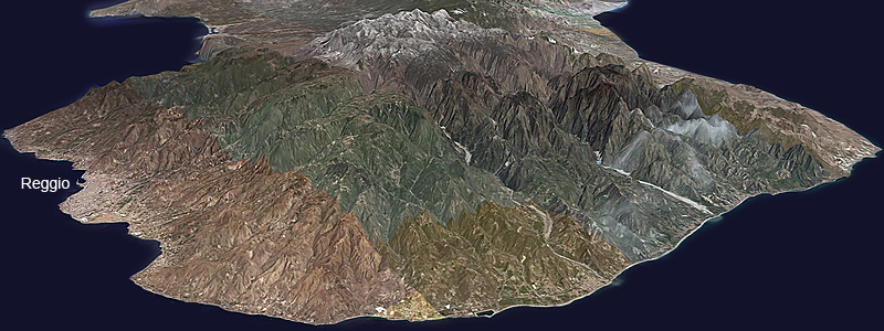 illustrazione che mostra la provincia di Reggio Calabria.